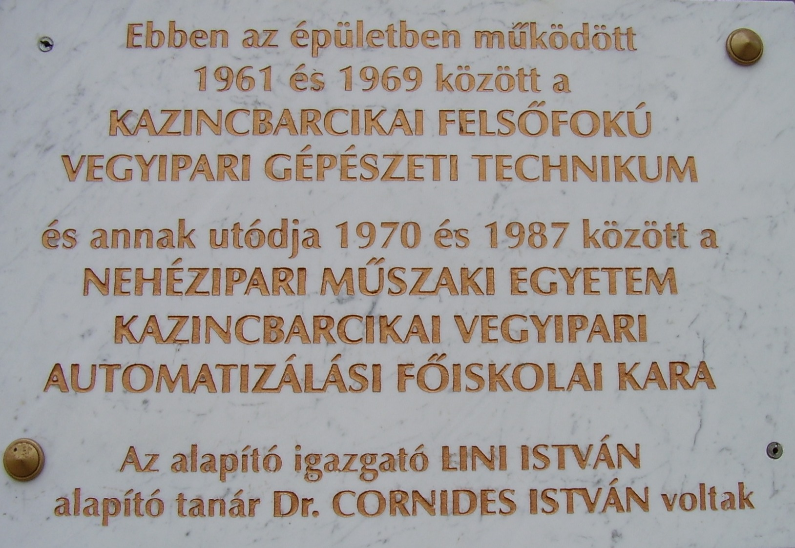 Emléktábla az Irinyi János Református Szakközépiskola és Diákotthon bejáratánál, Kazincbarcika